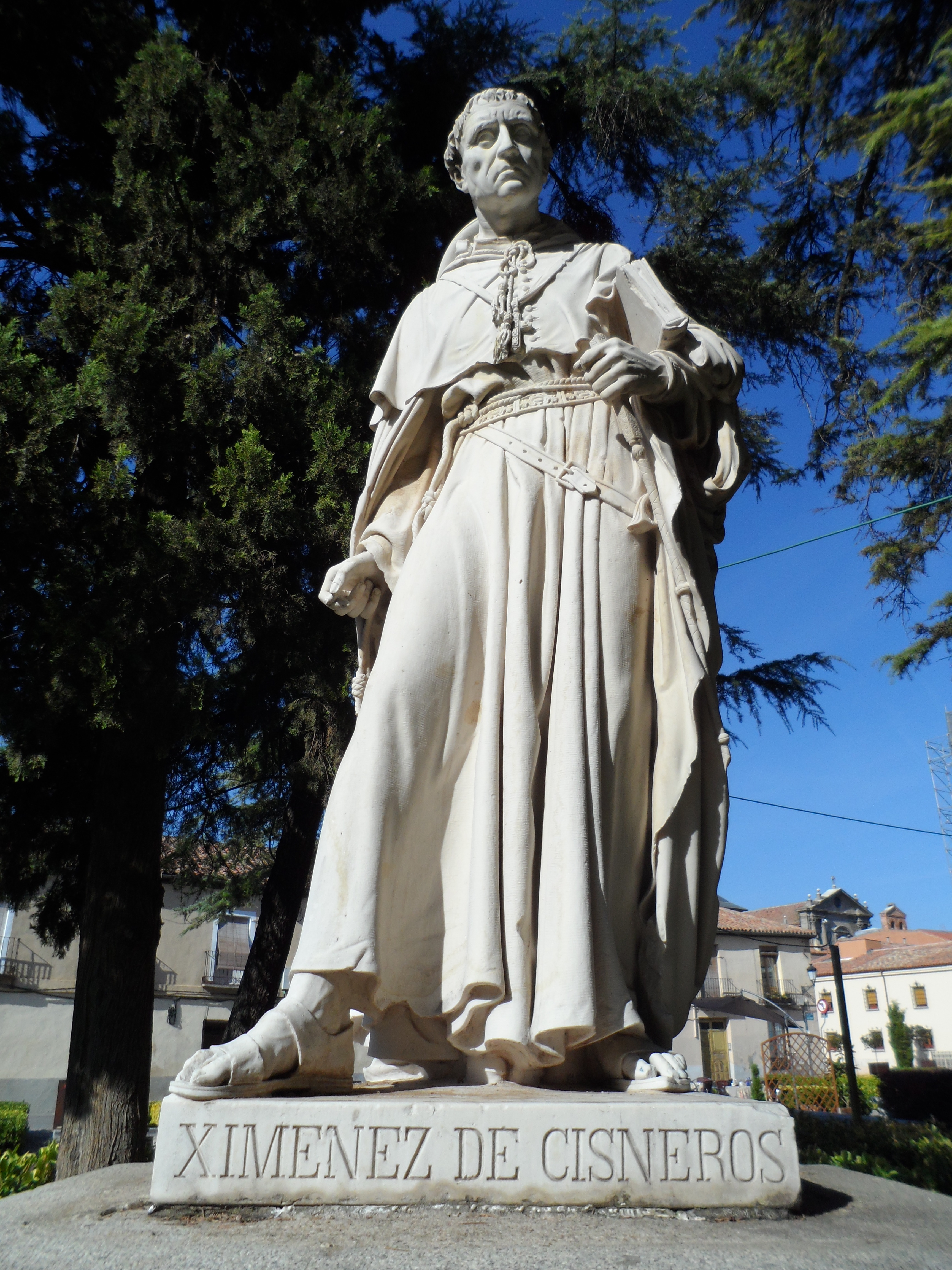 La estatua del Cardenal Cisneros situada en la plaza de San Diego frente a la fachada de la Universidad, recuerda al fundador de esta institución. Este monumento fue obra del escultor malagueño José Vilches terminada en el año 1864 en Roma y posteriormente traida a Alcalá de Henares.